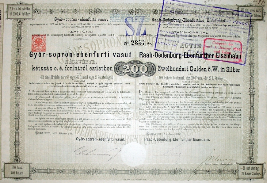 Aktie der GYSEV von 1876